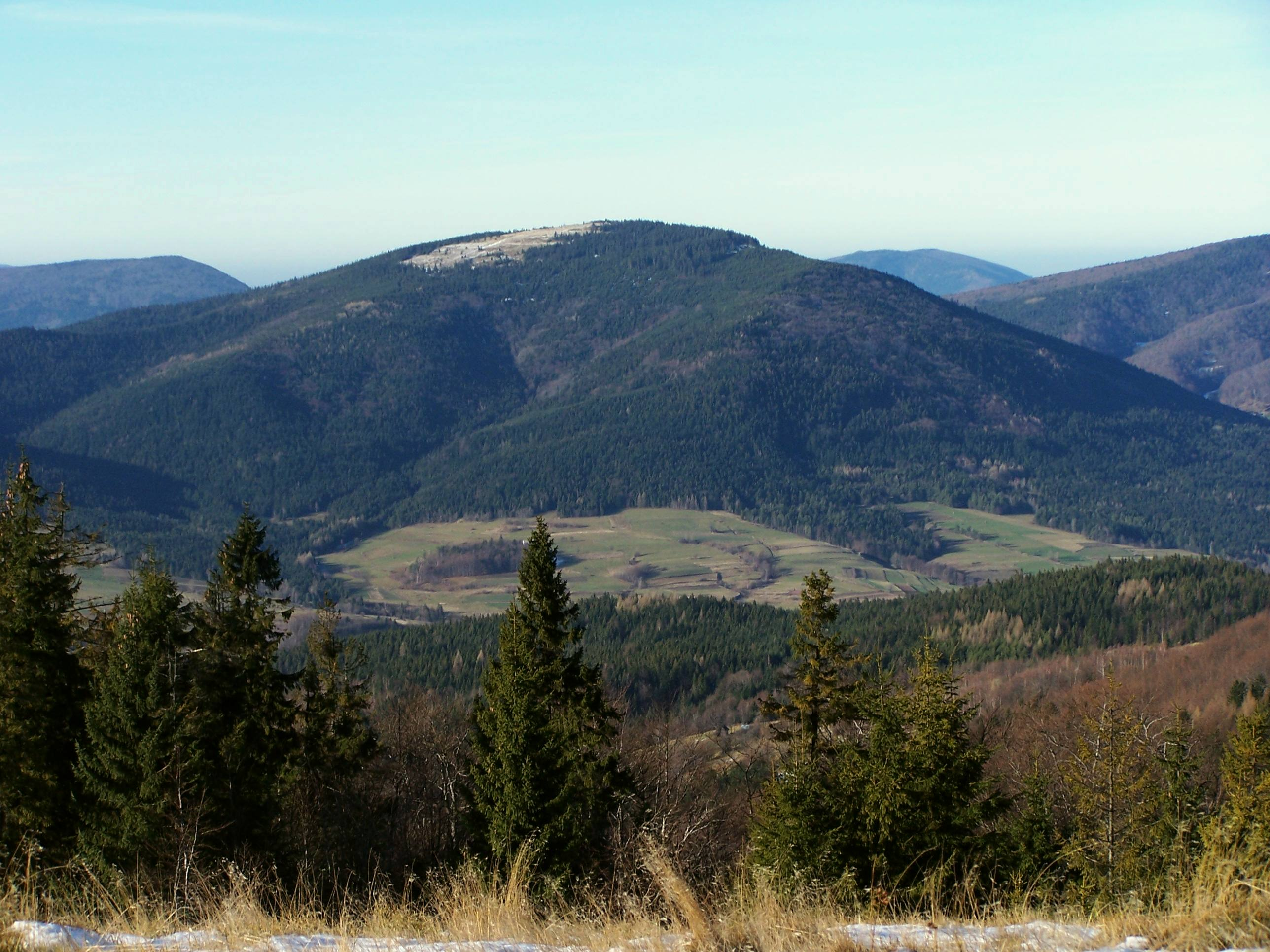 Ćwilin (Beskid Wyspowy)